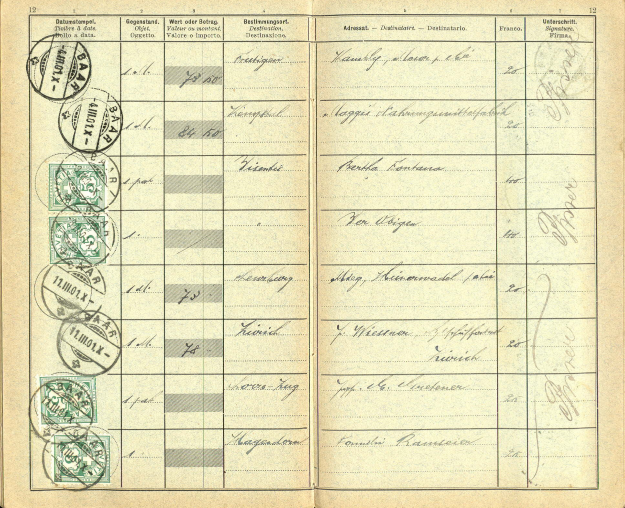 Empfangsscheinbuch der Schweizerischen Post, Form. Nr. 3153 (ab 1879)